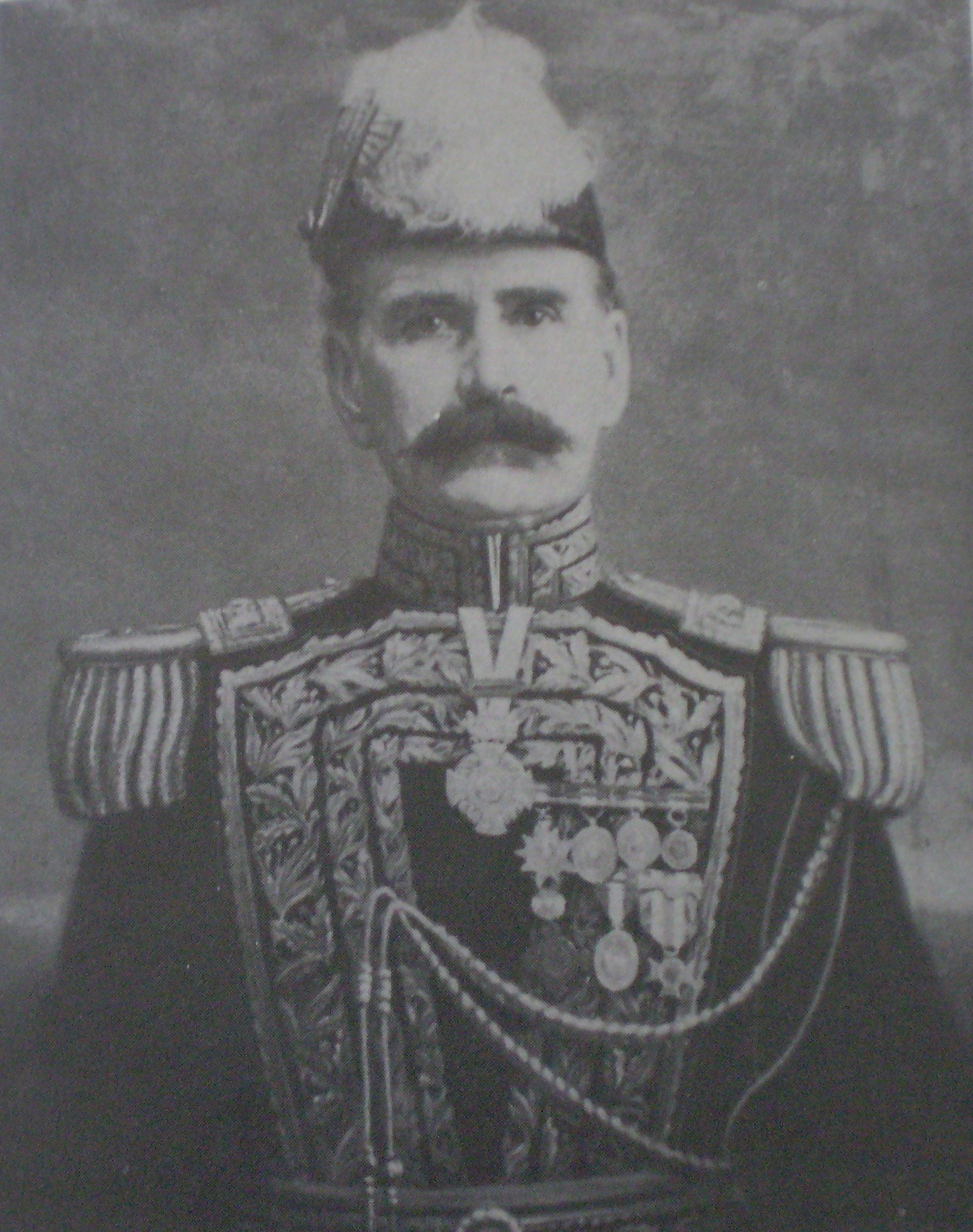 Donato Álvarez